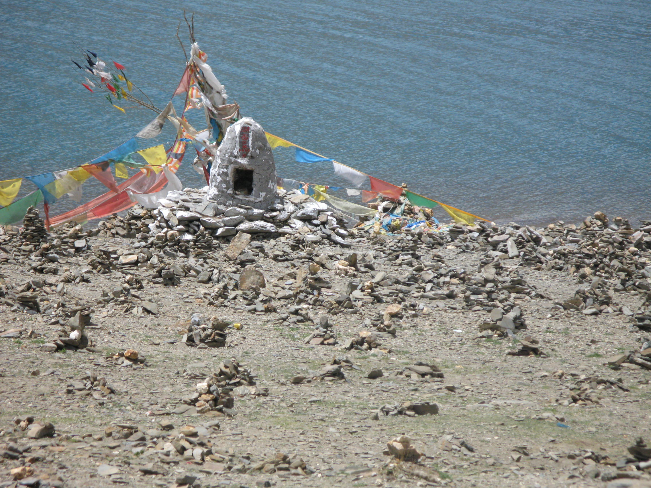 Možici ob jezeru Yamdrok Tso v Tibetu.